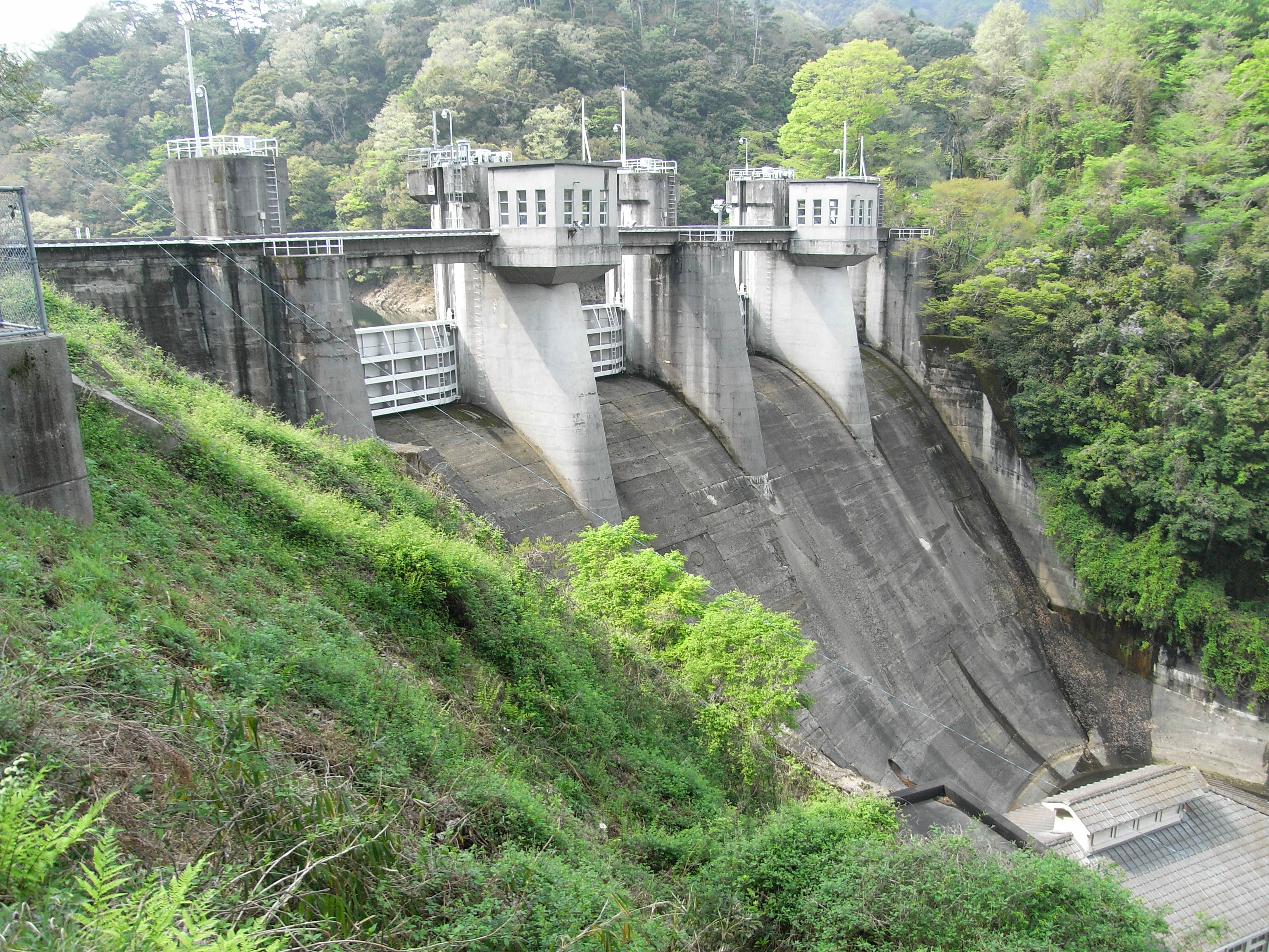 Dam